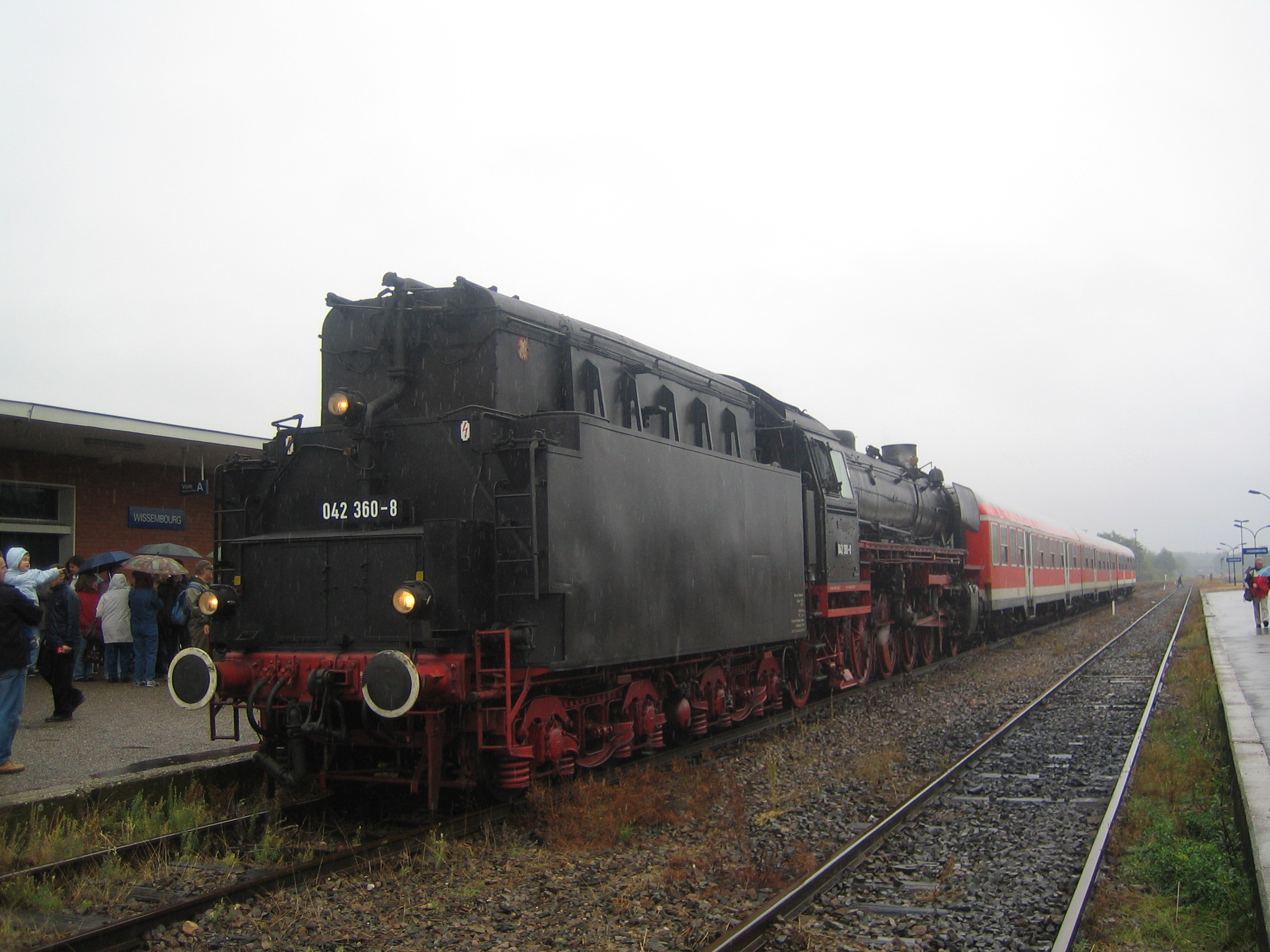 Dampfzug im Bf. Wissembourg. Die Lokomotive der DB-Baureihe 042 wurde aus der Baureihe 41 umgebaut und mit Ölhauptfeuerung versehen